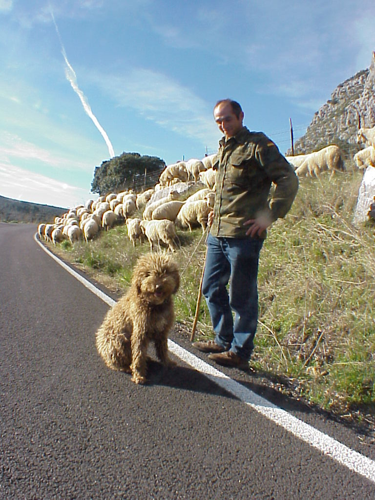 Perro de Agua Espanol als Hütehund Susanne Lorenz,Bild bereitgestellt von Simon Garcia Garcia/Malaga Bereitgestellt am: 31.08.2006